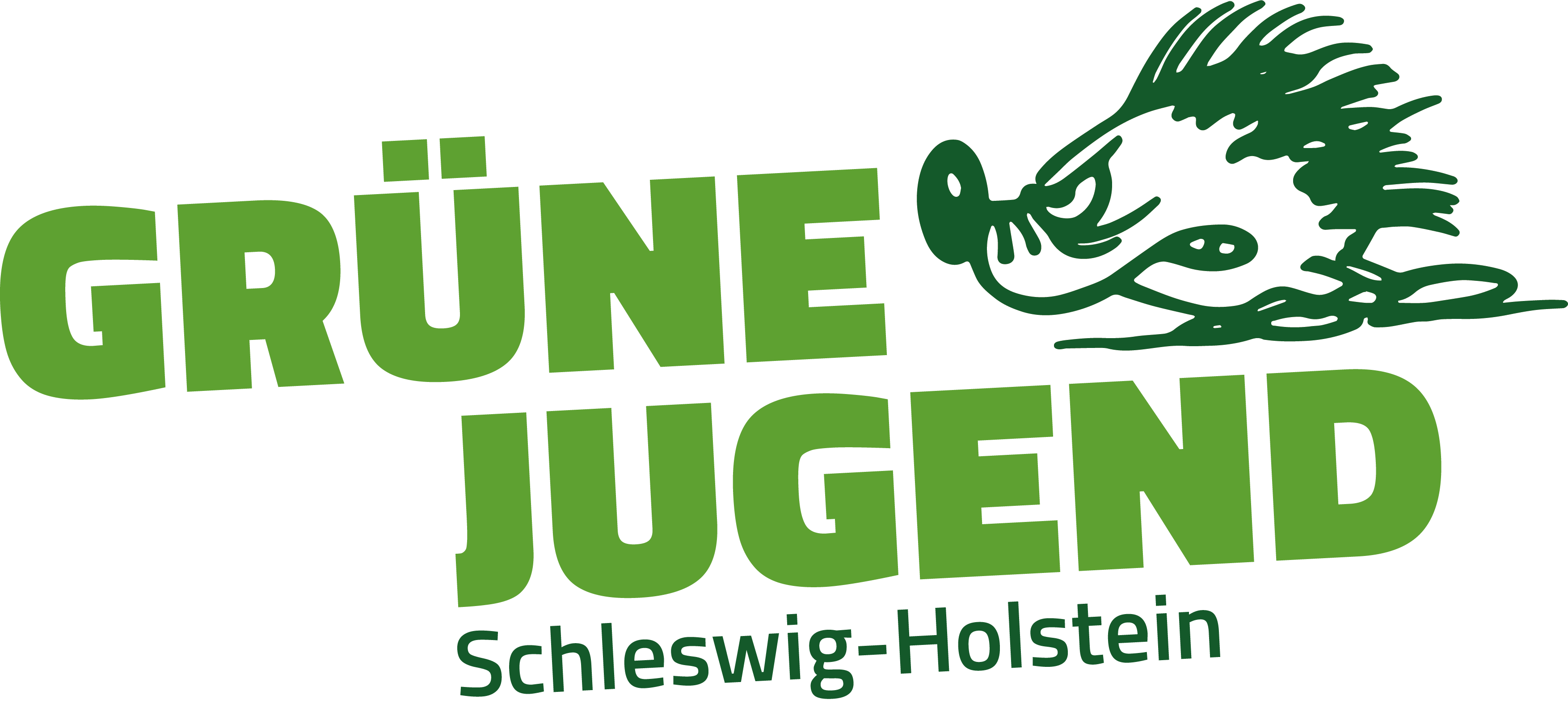 Das Logo der Grünen Jugend Schleswig-Holstein.